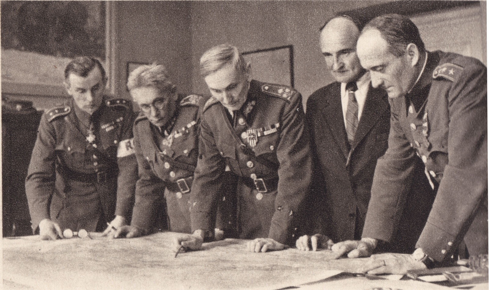 Záběr z povstaleckého velitelství "Alex" po skončení Pražského květnového povstání 1945. Zleva do prava: major pěchoty Theodor Pokorný; brigádní generál František Slunečko; brigádní generál Zdeněk Novák; nadporučík v záloze, bývalý šéfredaktor "Pestrého týdne" nakladatel Karel Neubert; podplukovník generálního štábu Raimund Mrázek. Praha, květen 1945.